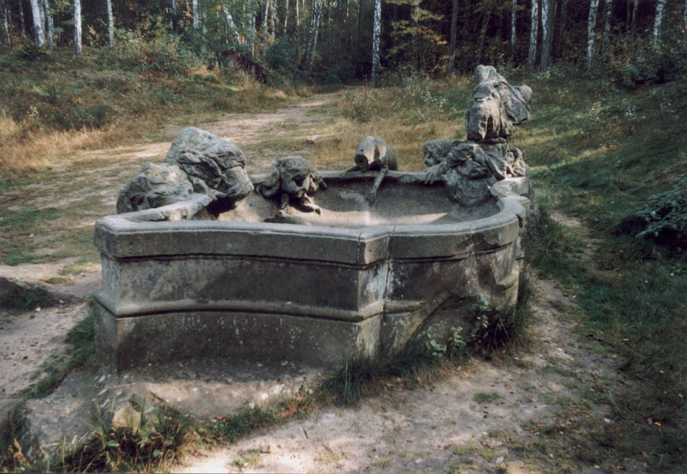 Jákobova studna (Ježíš a Samařanka u studny), Nový les u Kuksu, Matyáš Bernard Braun a jeho dílna 1727-29